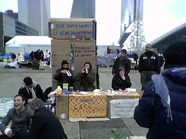 Photo du campement des "Indignés" sur l'Esplanade de la Défense